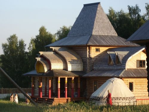 д. Валищево Подольский район Московской области